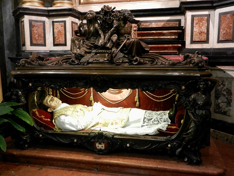 Torino - Tomba di S. Giuseppe Cafasso all'interno del Santuario della Consolata